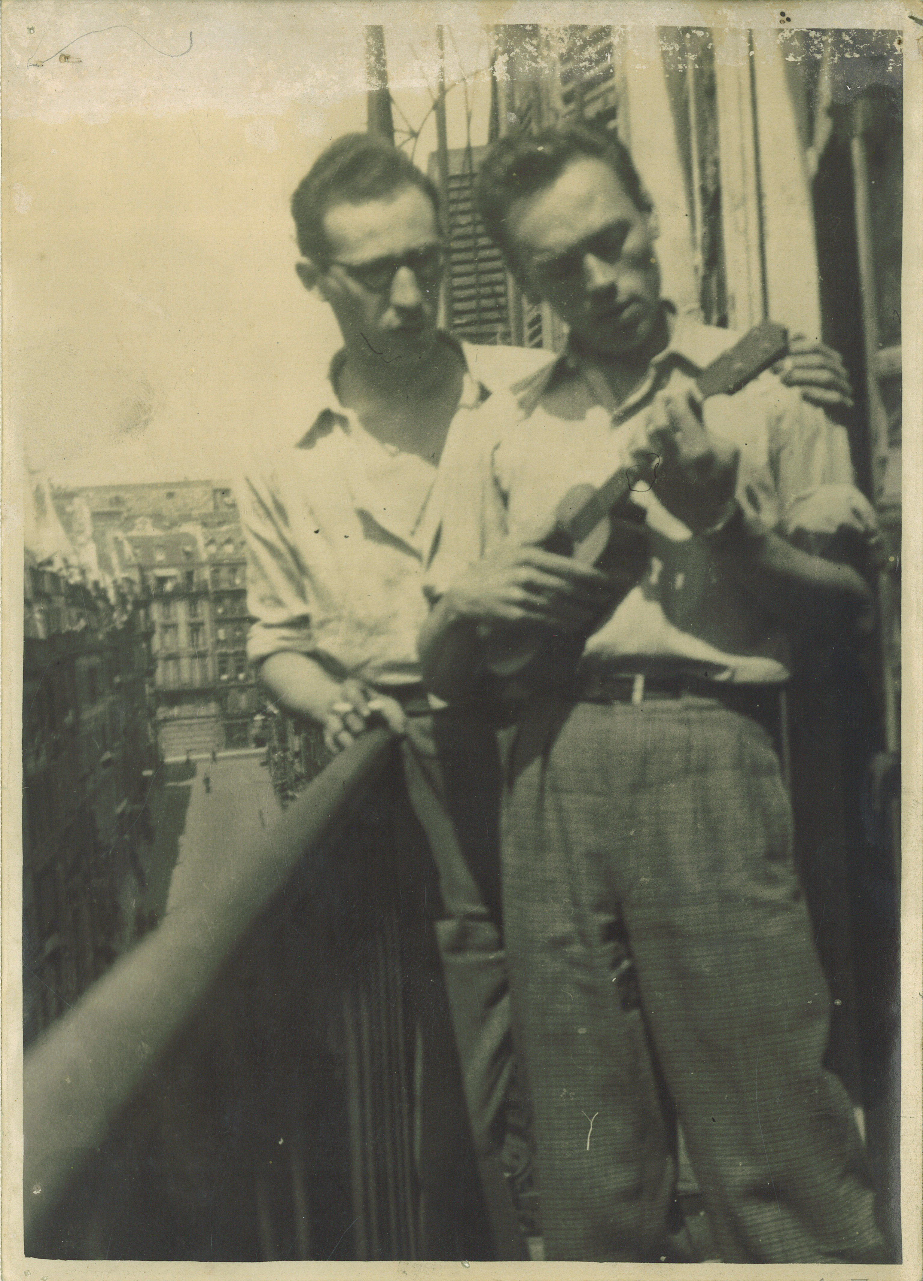 Maurice Pon (à gauche) photographié avec Bernard Michel.